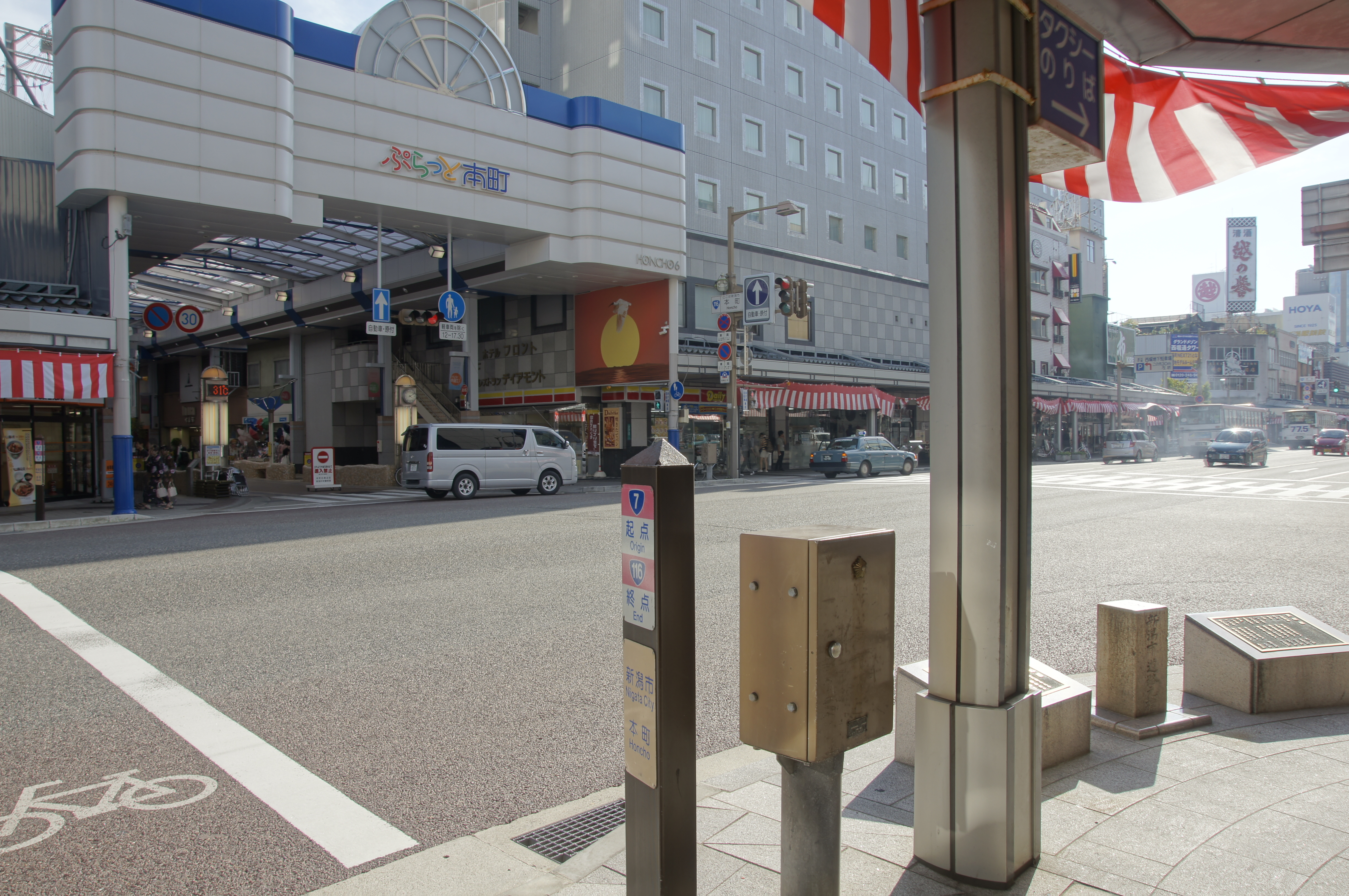 新潟県新潟市の本町交差点です。新潟県の道路元標があり、国道7号、国道8号、国道１７号他の起終点です。